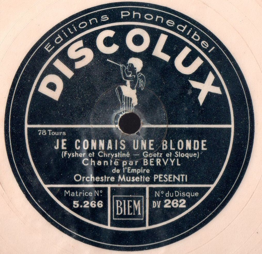 Disque souple Discolux. Circa 1930.